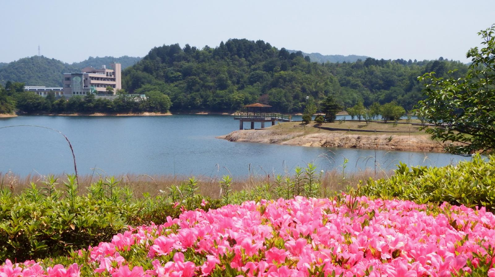 池田池公園（新居浜市）